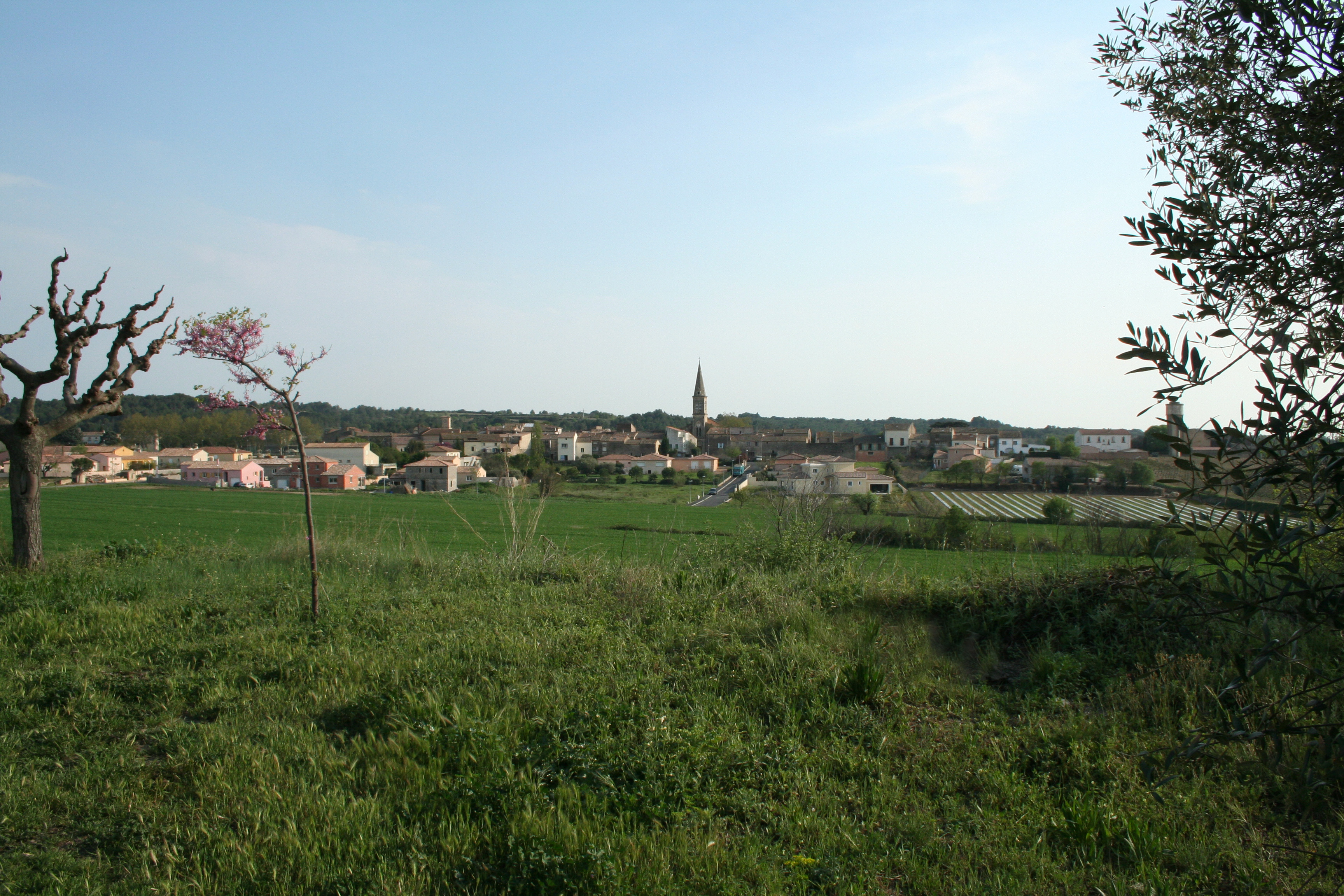 Aumes (Hérault)- vue générale.